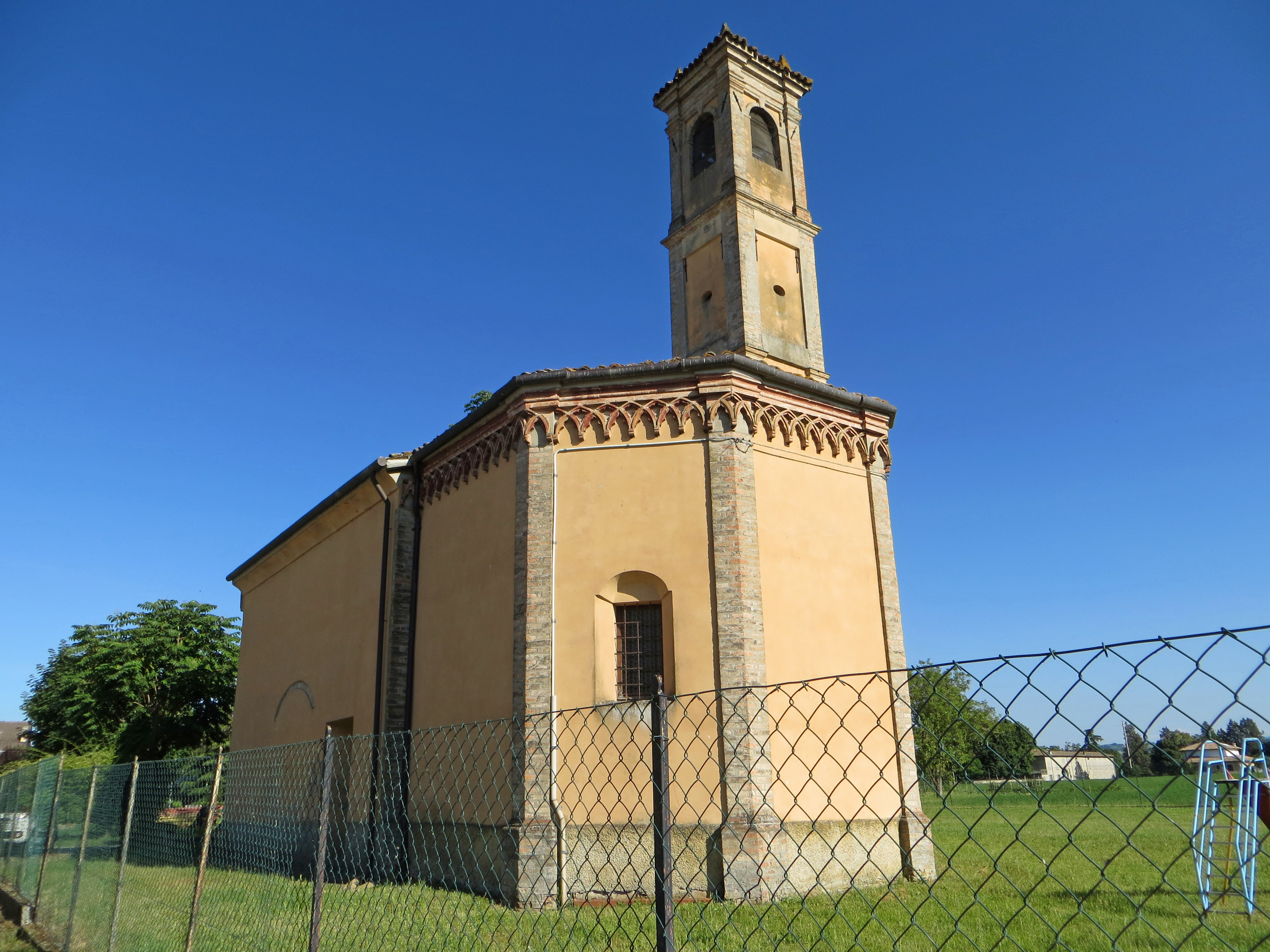 Oratorio di San Rocco (Casale, Felino) - abside e campanile